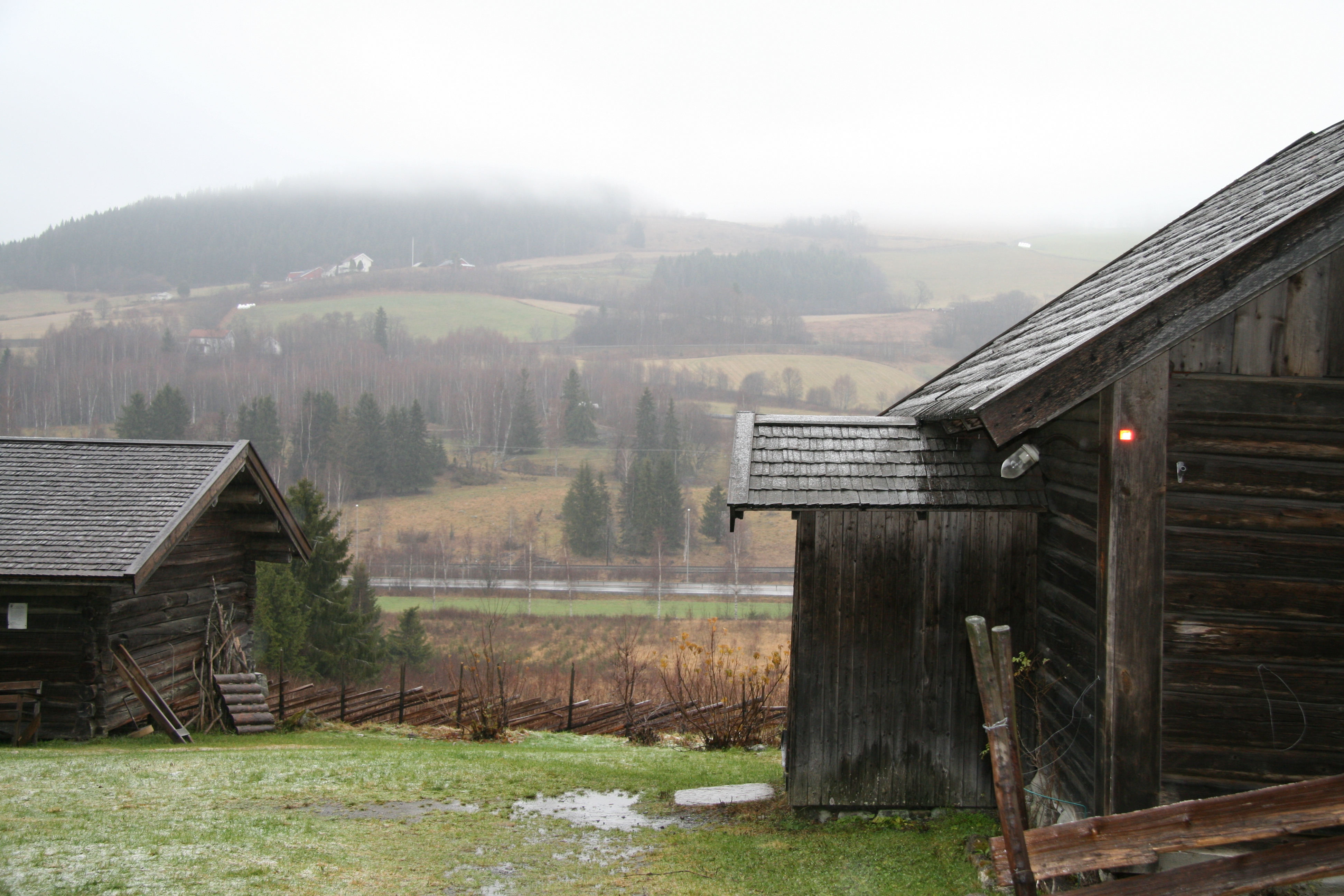 Nytt hus 14.11.13